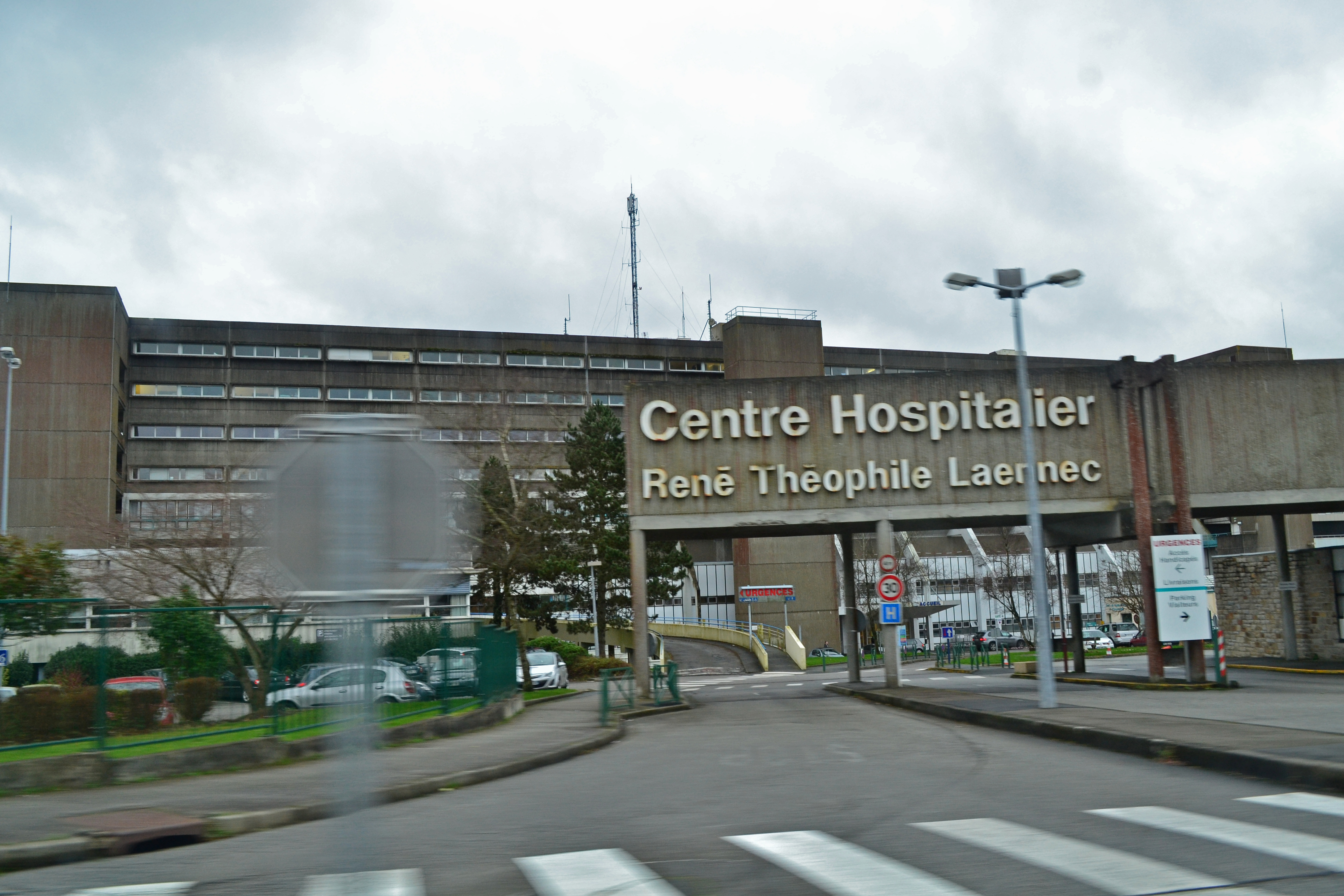 Centre Hospitalier Cornouaille - Hôpital Laënnec, à Quimper